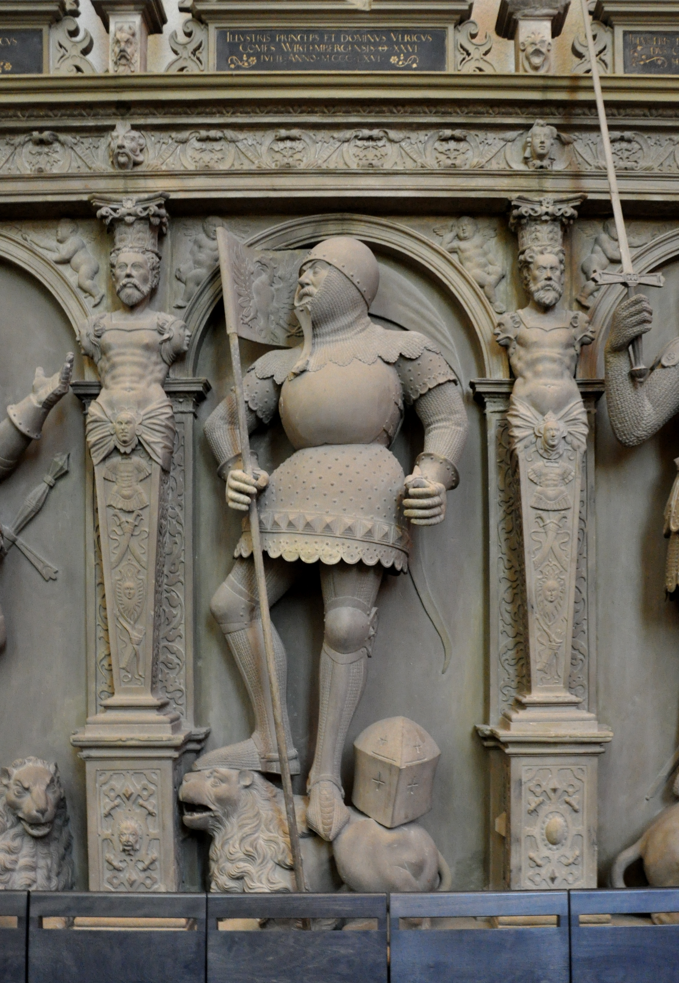 Stuttgart, Chor der Stiftskirche, Grafenstandbilder von Sem Schlör (ab 1576 entstanden zum Ersatz der ursprünglichen Epitaphe der in der Stiftskirche beigesetzten Grafen von Württemberg) Figur 4: Ulrich III. († 1344)